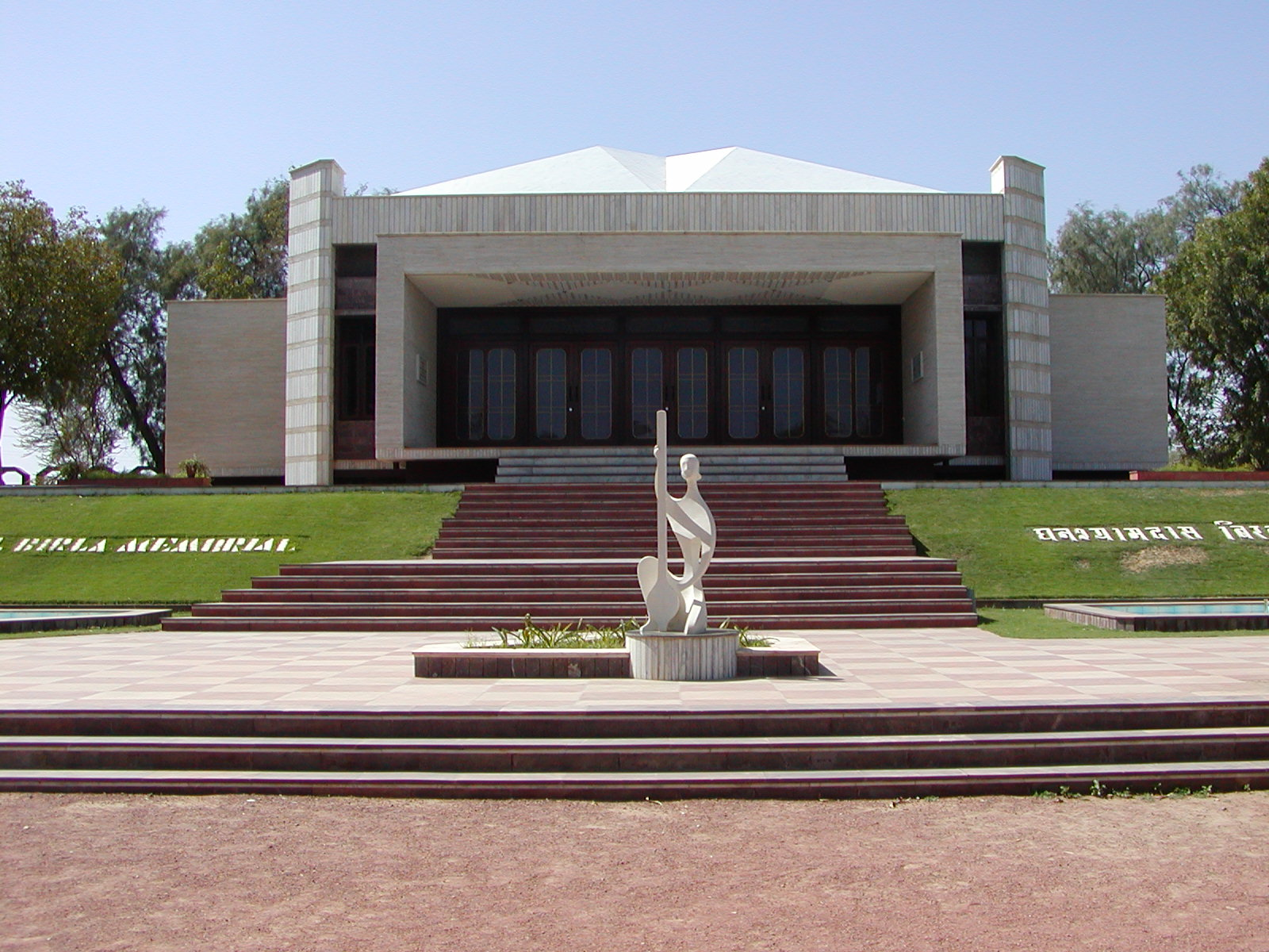 BIRLA MUSEUM, BITS PILANI